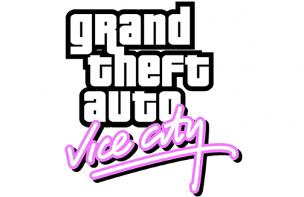 La imagen de dicho videojuego.